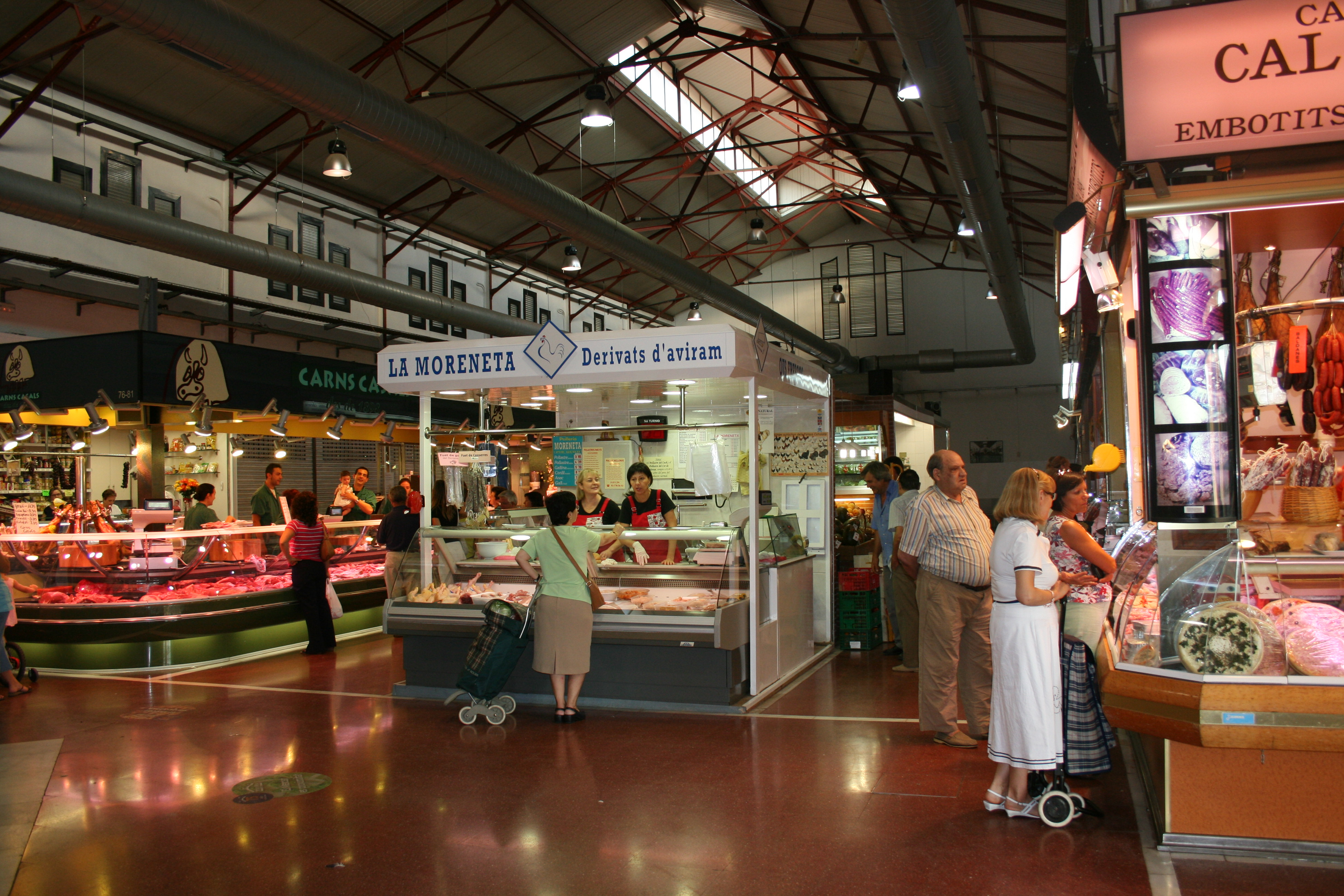 Vista interor del mercat